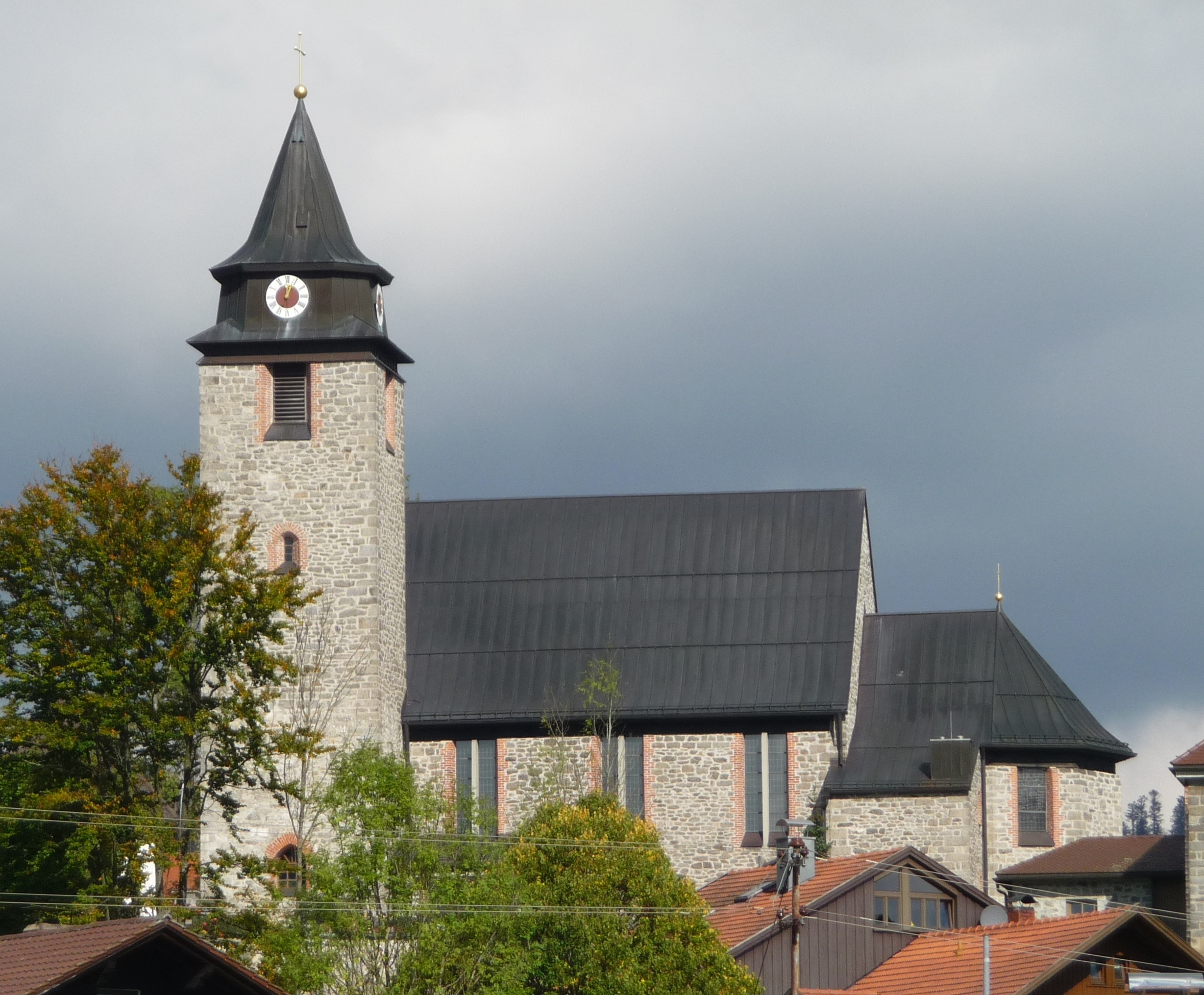 Die Pfarrkirche St. Heinrich und Gunther in Schönbrunn am Lusen